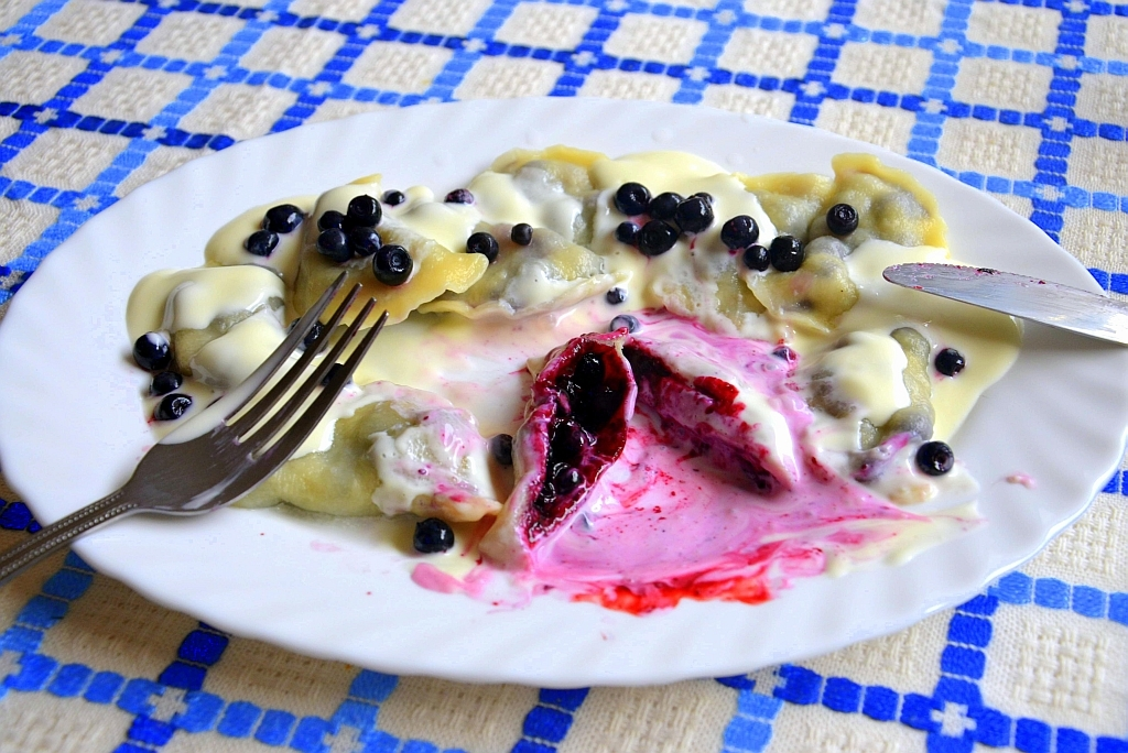 Teigtaschen mit Heidelbeerfüllung nach Figa z Makiem, Sanok (2013)